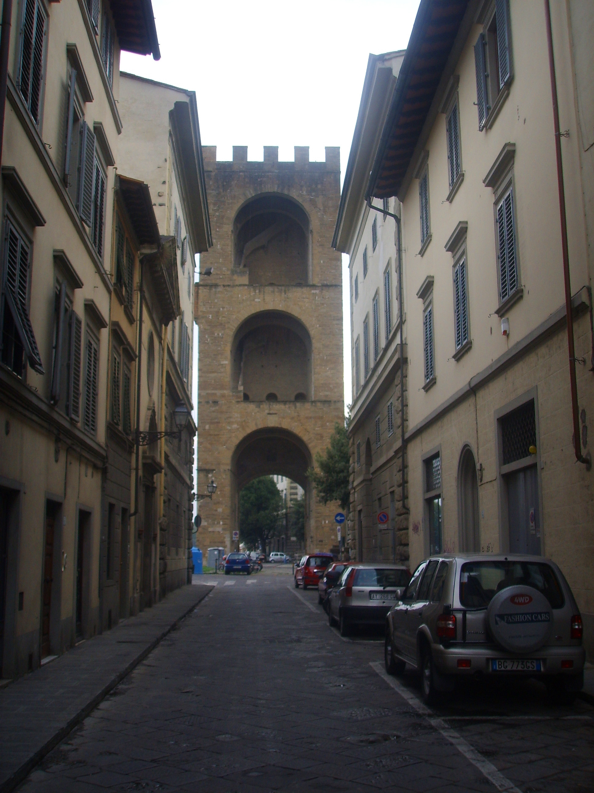 Porta_San Niccolo' in Florence, Italy